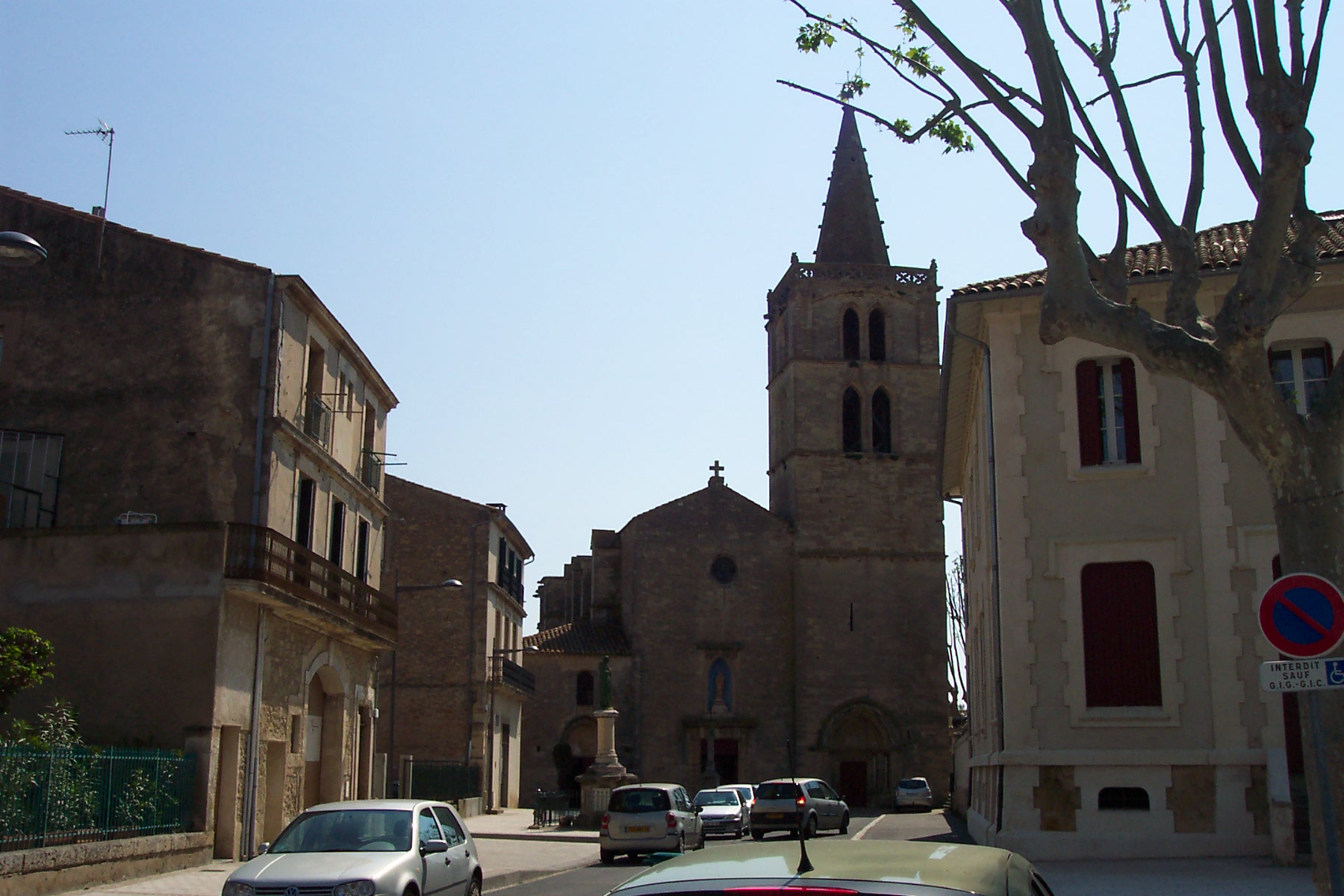 place et église